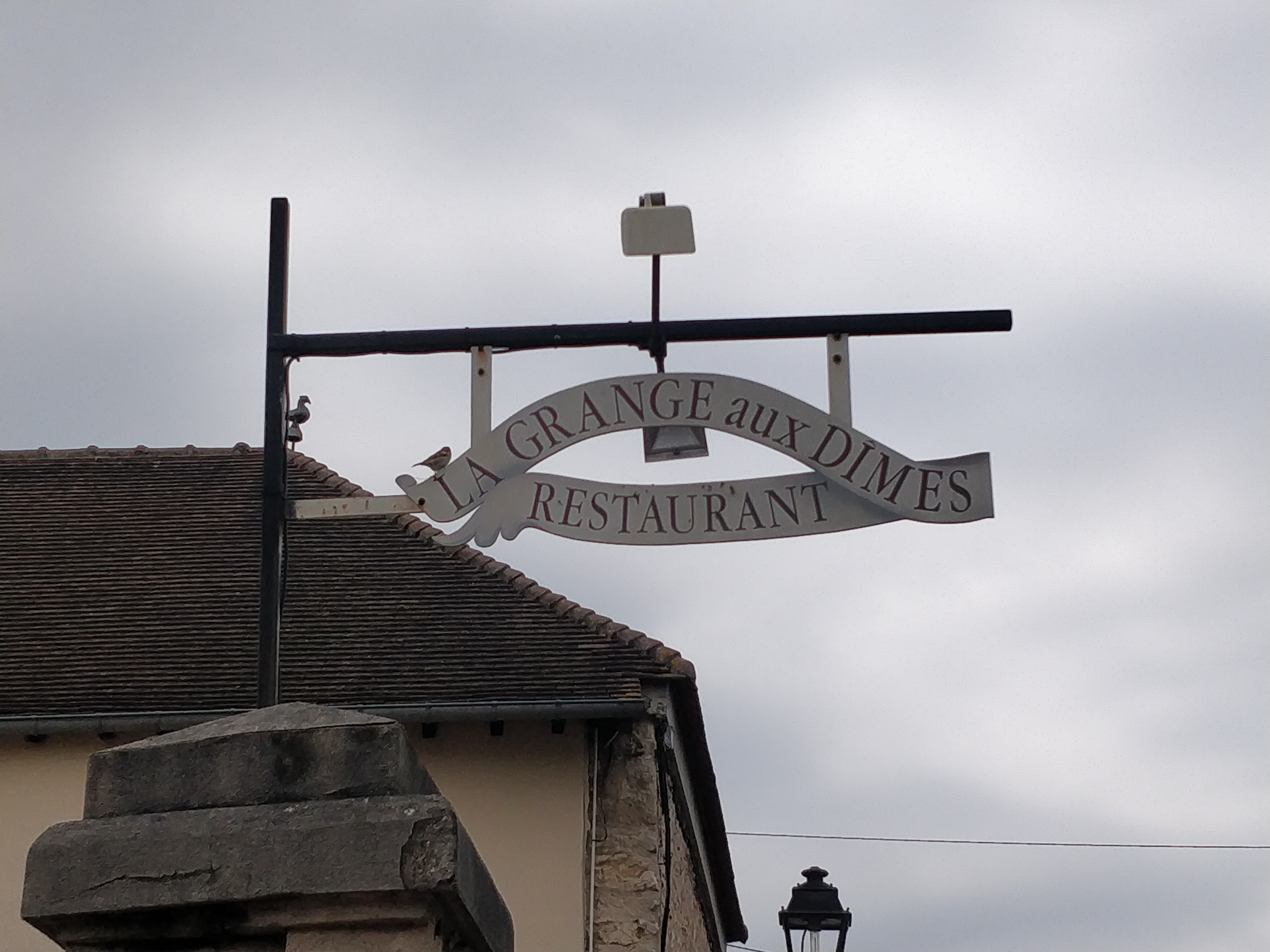 Grange aux dîmes, Wissous.